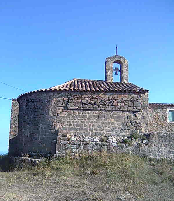 Vista lateral de la ermita románica de Sant Mateu del Bosc en el término municipal de Premiá de Dalt en la provincia de Barcelona (Spain)